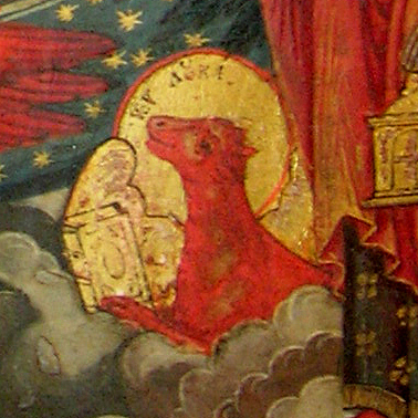 Ікона з Веткаўскага музея